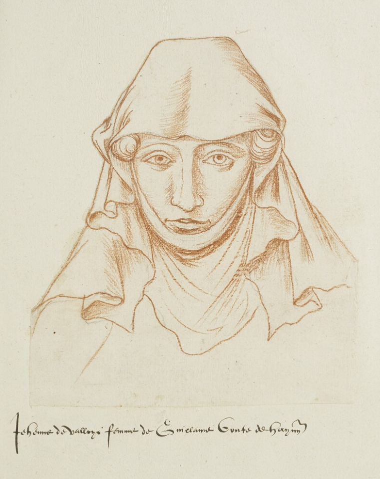 Jeanne de Valois (1294-1352)